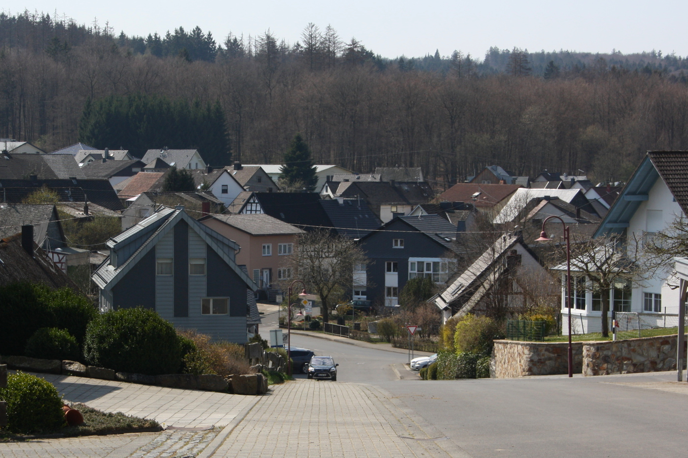 Gehlert, Westerwaldkreis, Rheinland-Pfalz, Deutschland